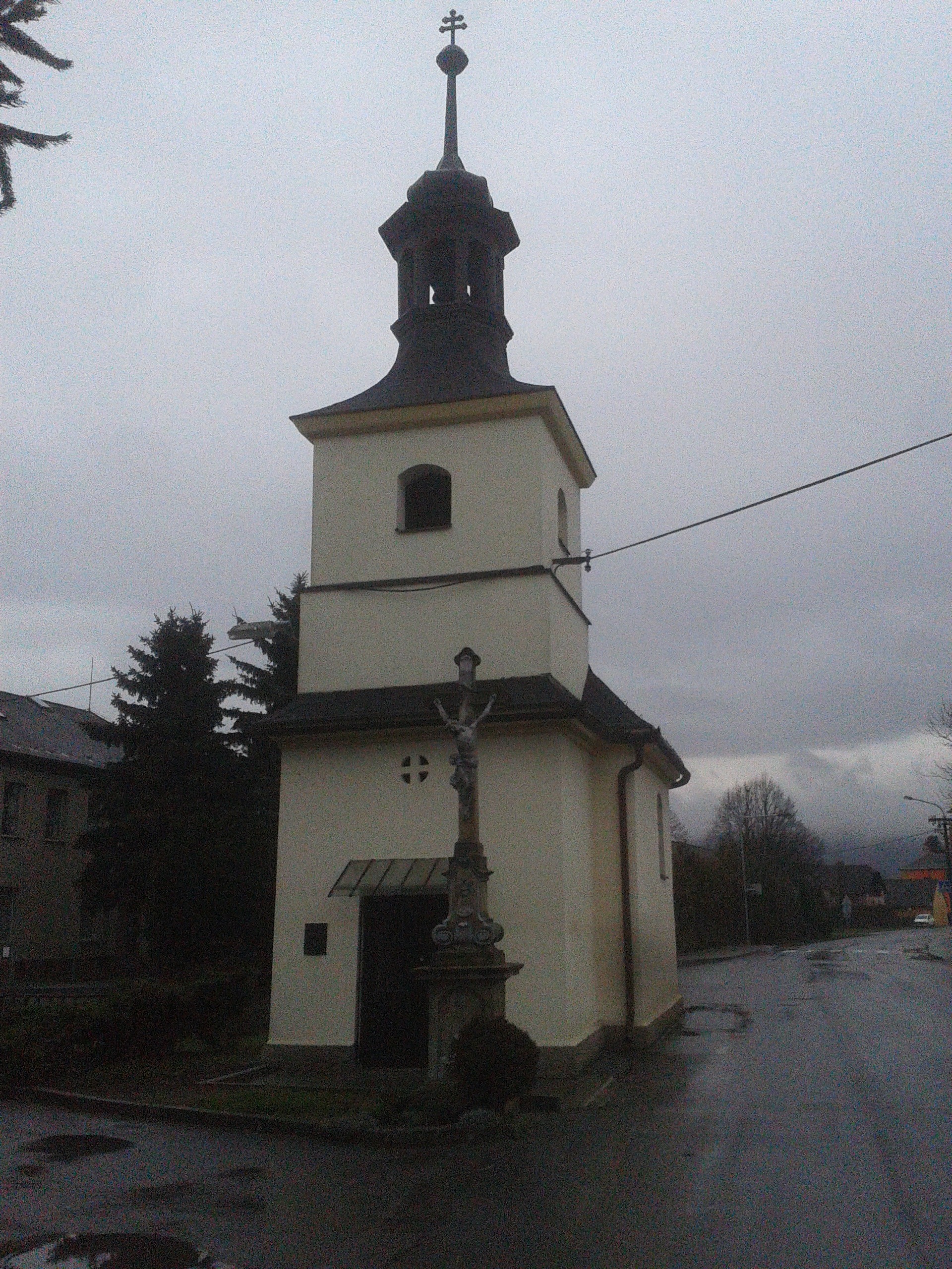 Bohuslavice kaplička